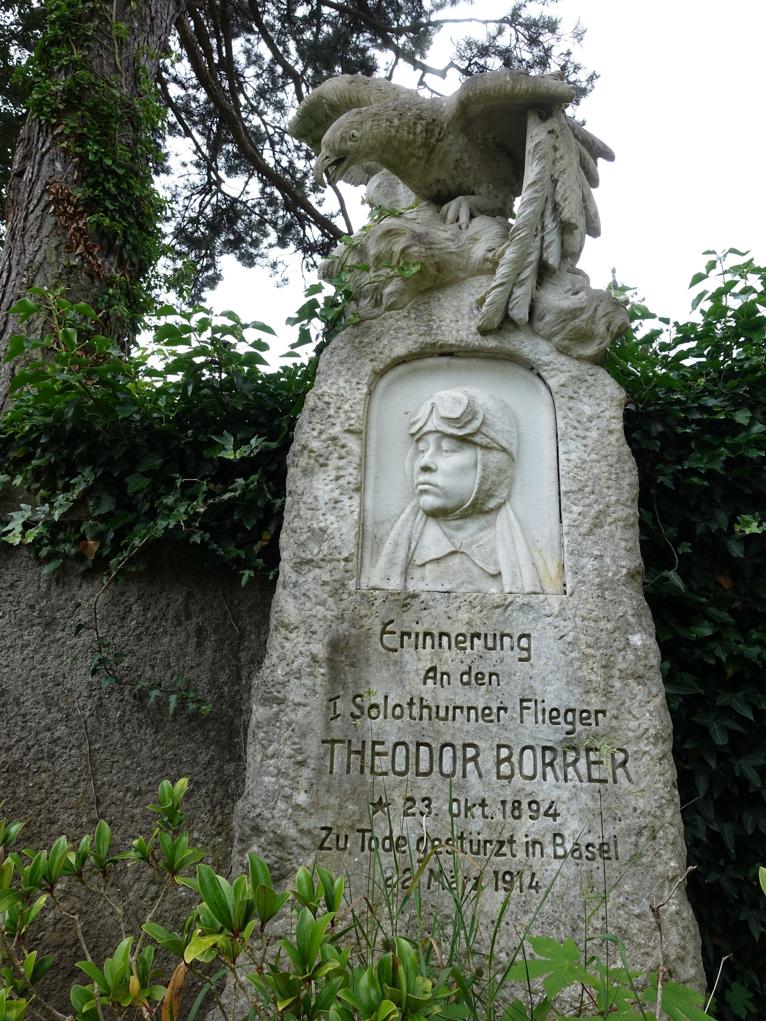 Theodor Borrer (1894–1914) Flugpionier. Grab auf dem Friedhof St. Katharinen in Solothurn.